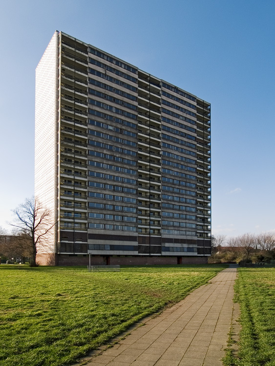 „Weißer Riese“ an der Ottostraße in in Duisburg-Hochheide